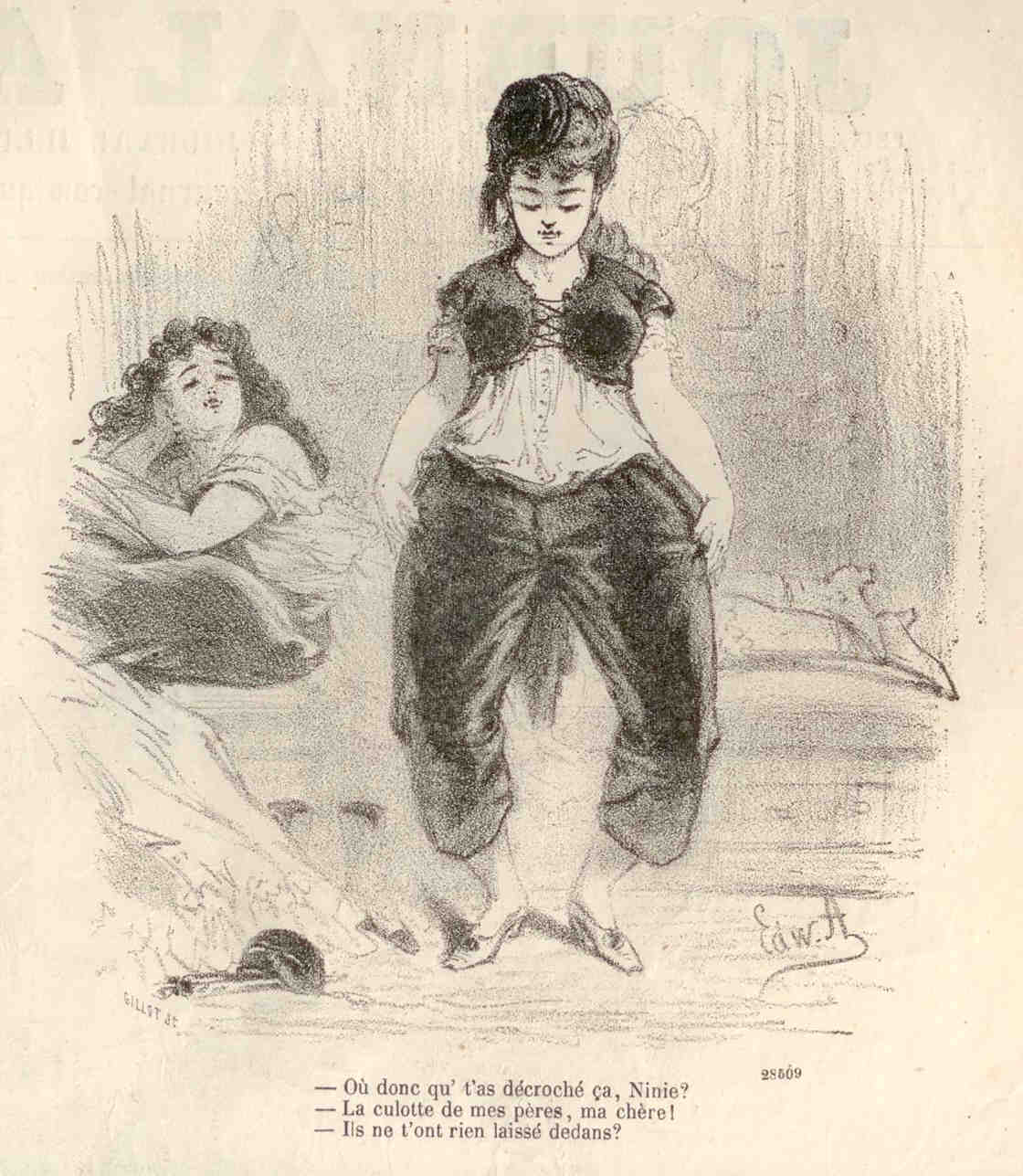 Dessin d'Edward Ancourt illustrant les bals masqués du Carnaval de Paris, extrait du Journal Amusant, numéro 737, 12 février 1870.